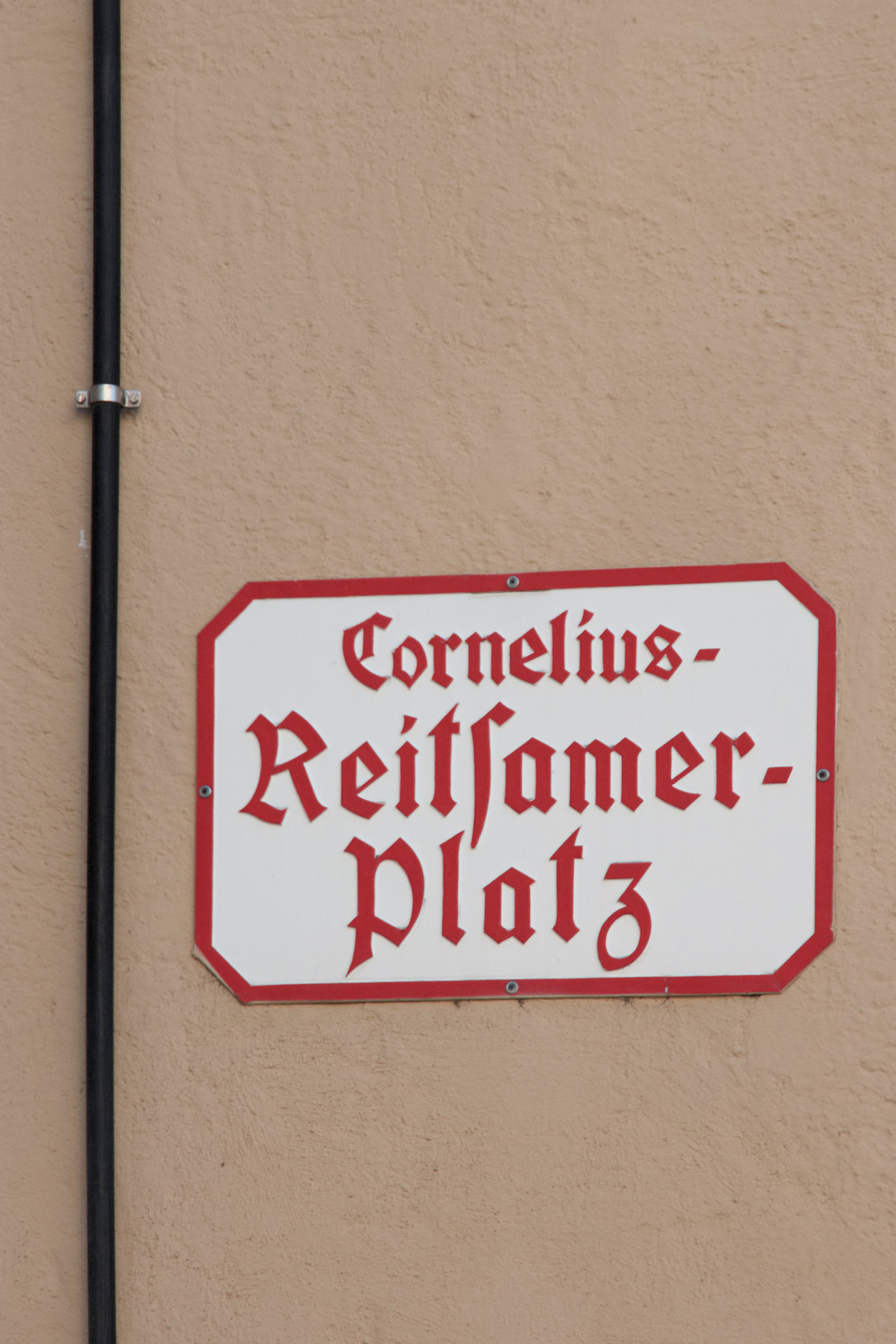 Salzburg, rechte Altstadt: Stefan-Zweig-Platz, vormals Cornelius-Reitsamer-Platz - altes Straßennamenschild